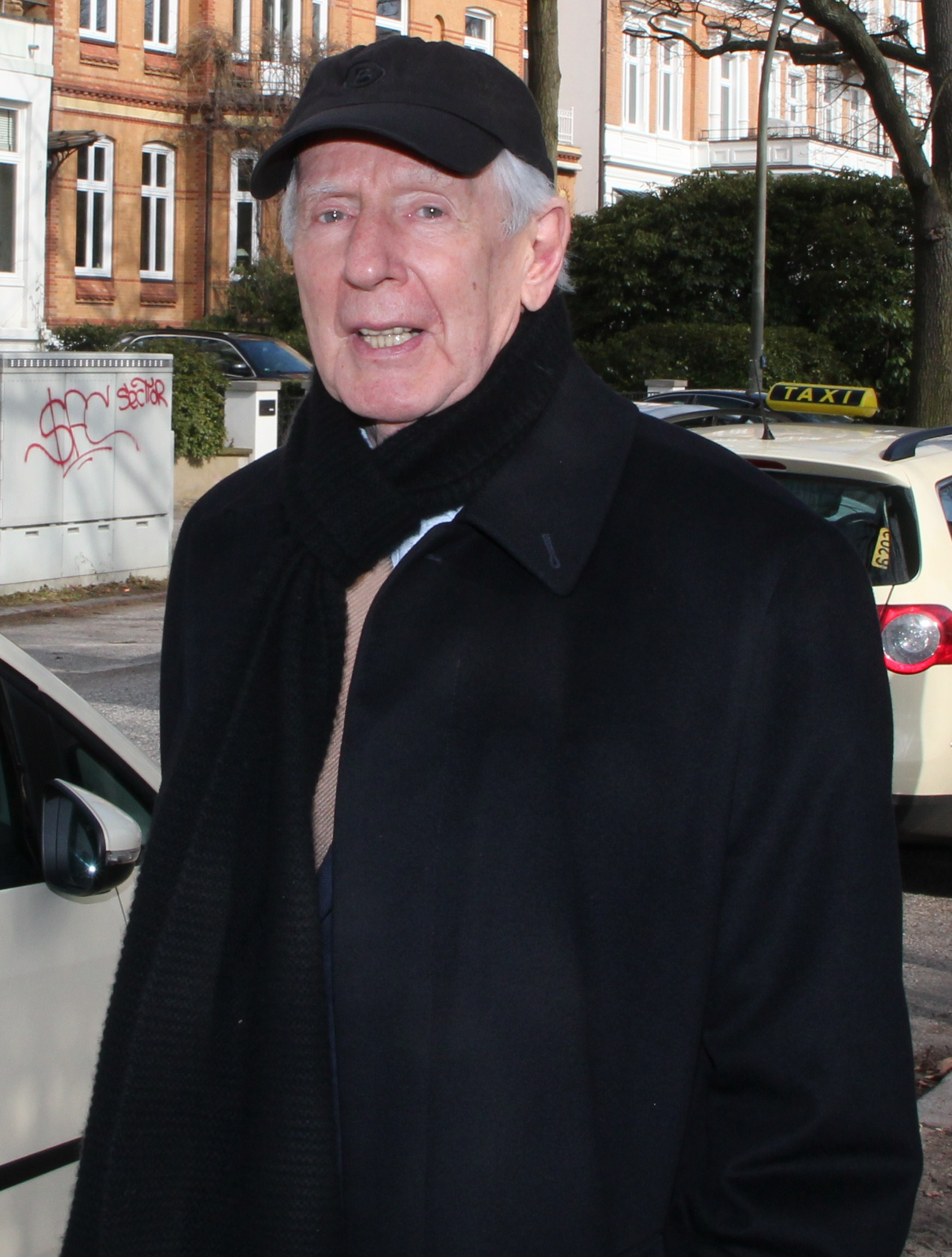 Klaus Karl Anton von Dohnanyi [doˈnaːni] (* 23. Juni 1928 in Hamburg) ist ein deutscher Jurist und Politiker (SPD). Er war von 1972 bis 1974 Bundesminister für Bildung und Wissenschaft und von 1981 bis 1988 Erster Bürgermeister der Freien und Hansestadt Hamburg.